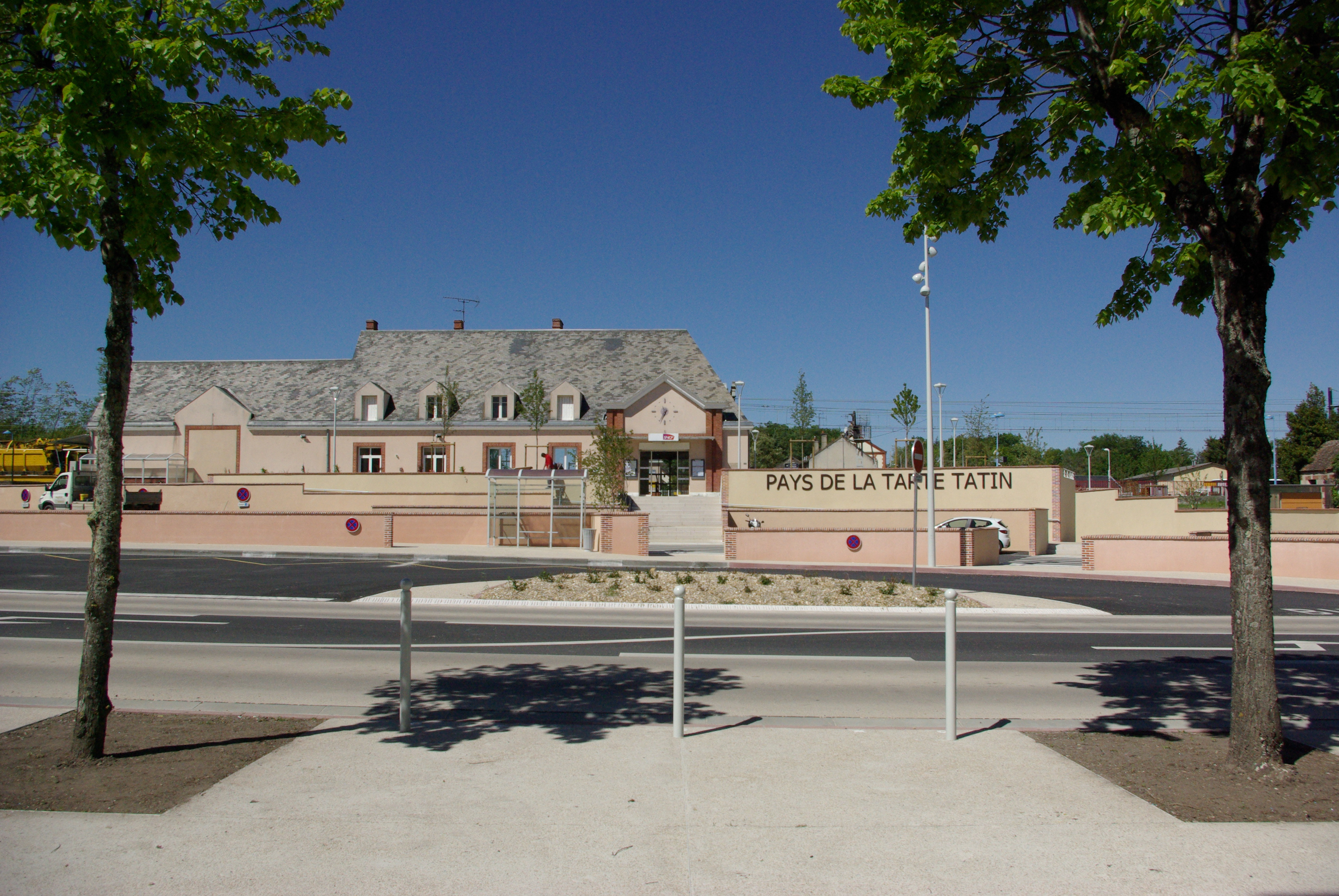 Espace gare réaménagé